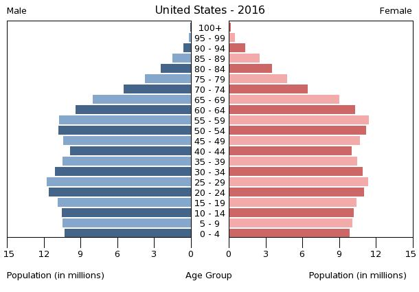 Bevölkerungspyramide der USA